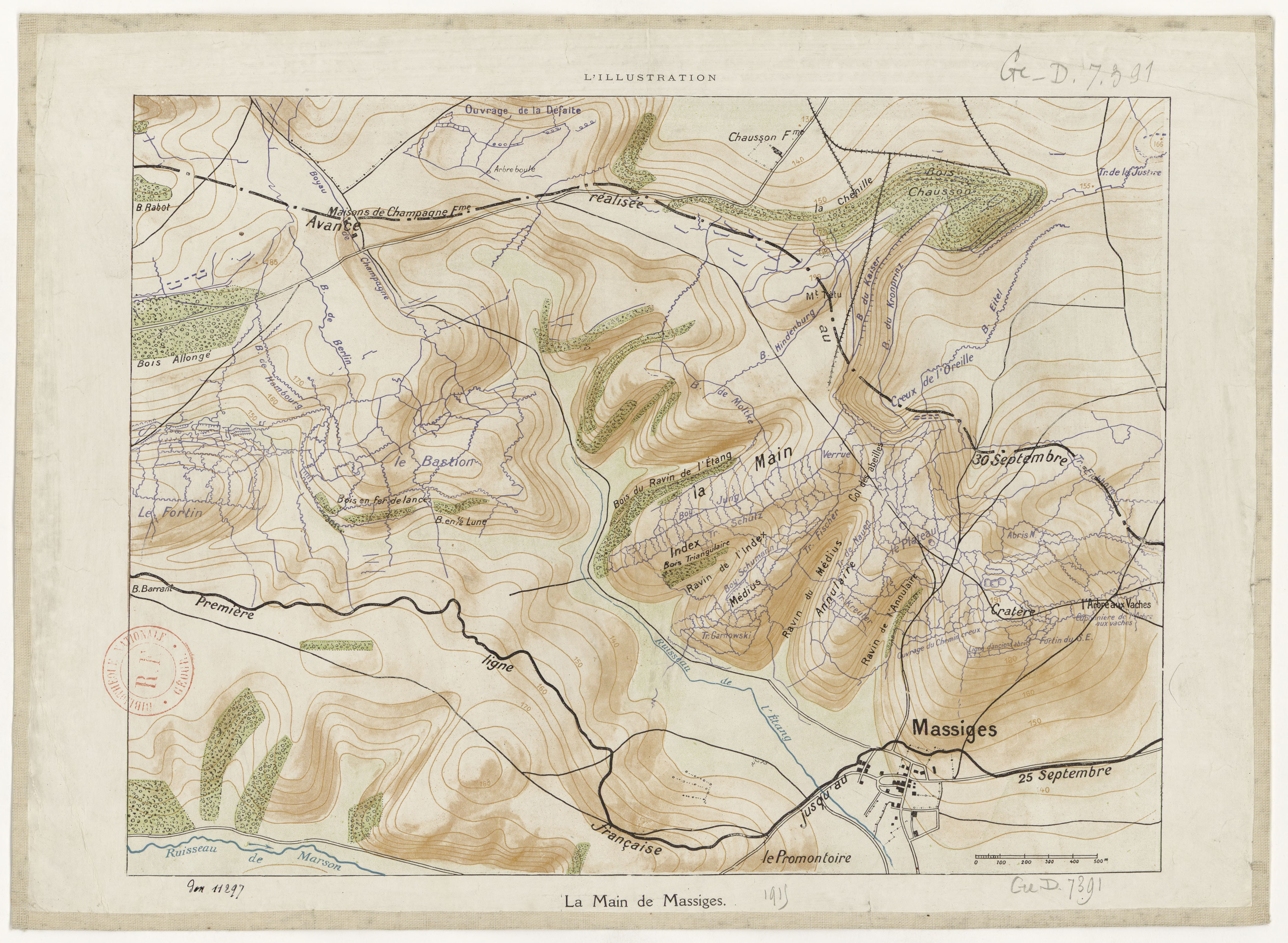 La Main de Massiges. Guerre mondiale (1914-1918)